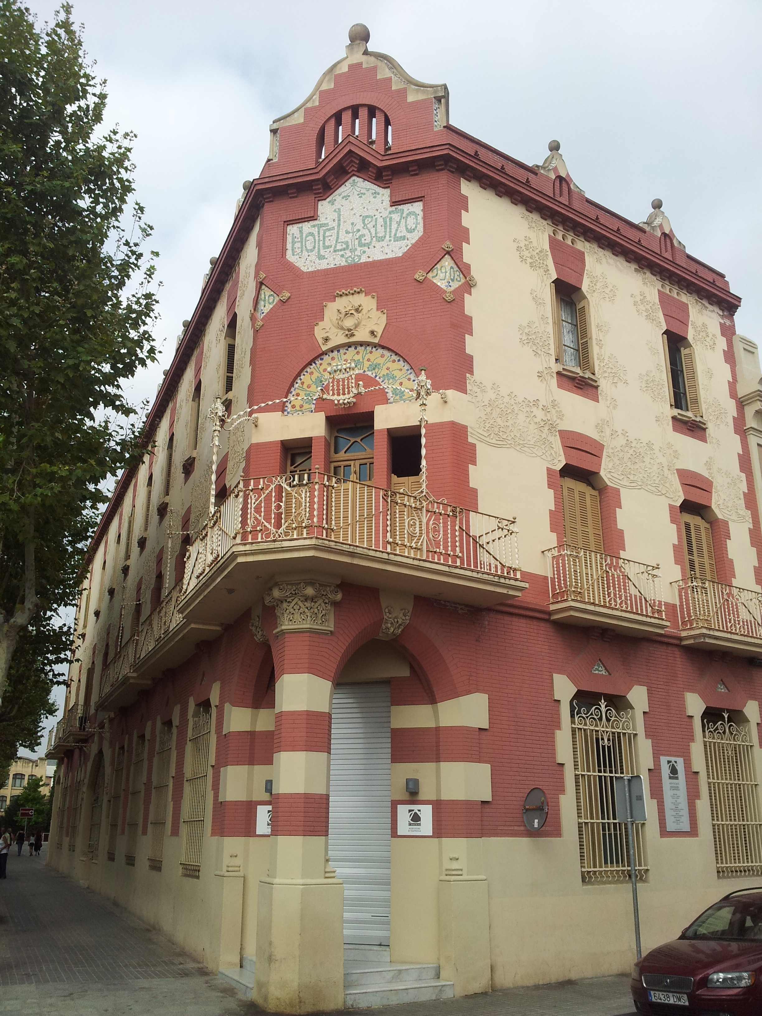 Sabadell